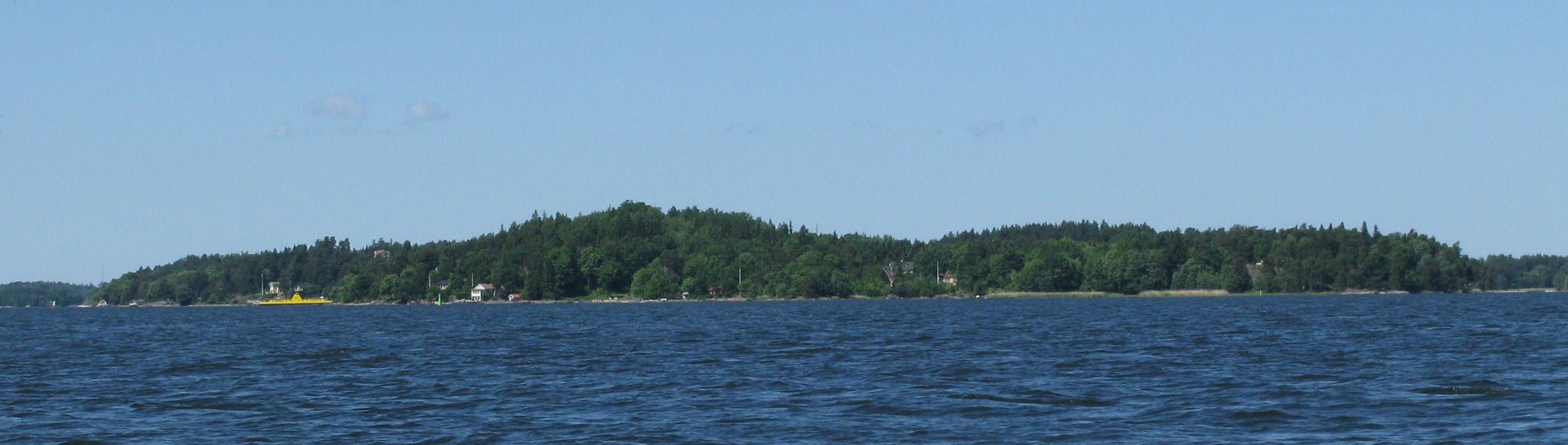 Tynningö sett från sydöst. Källa: Eget foto, fotograf EnDumEn, 27 juni 2010